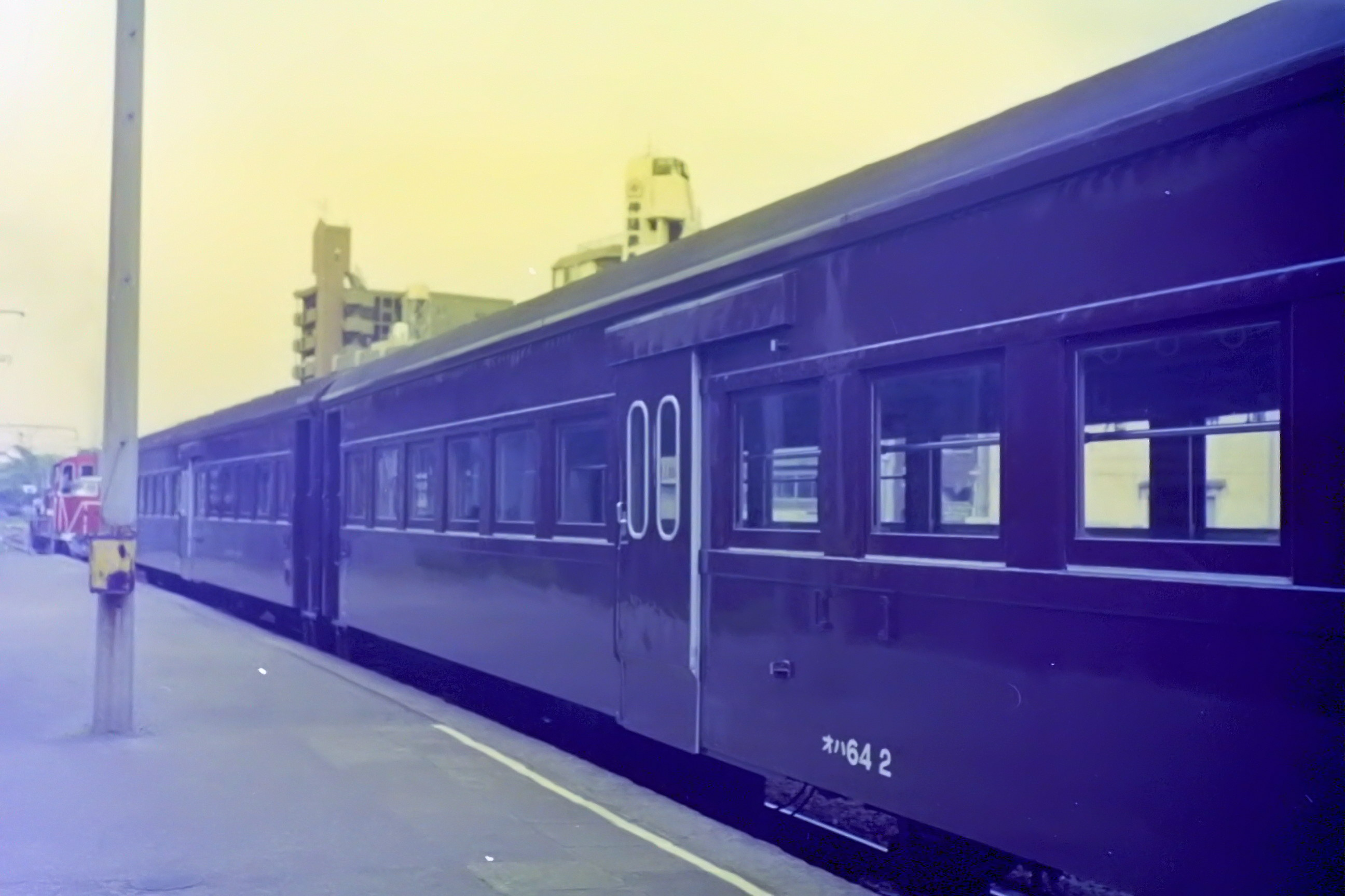 オハ６４ ２ 増設扉